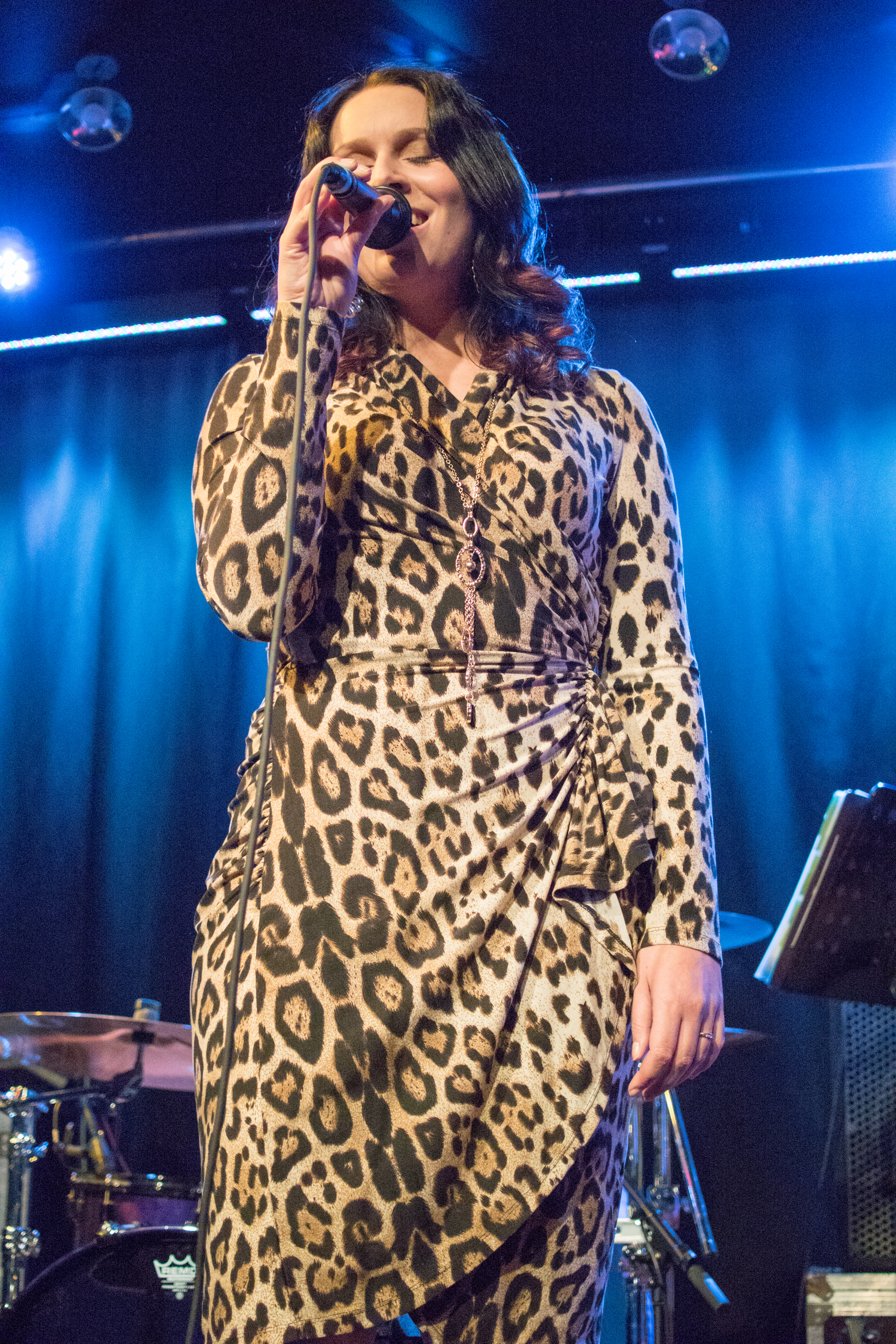 Terhi Matikainen suomalainen laulaja